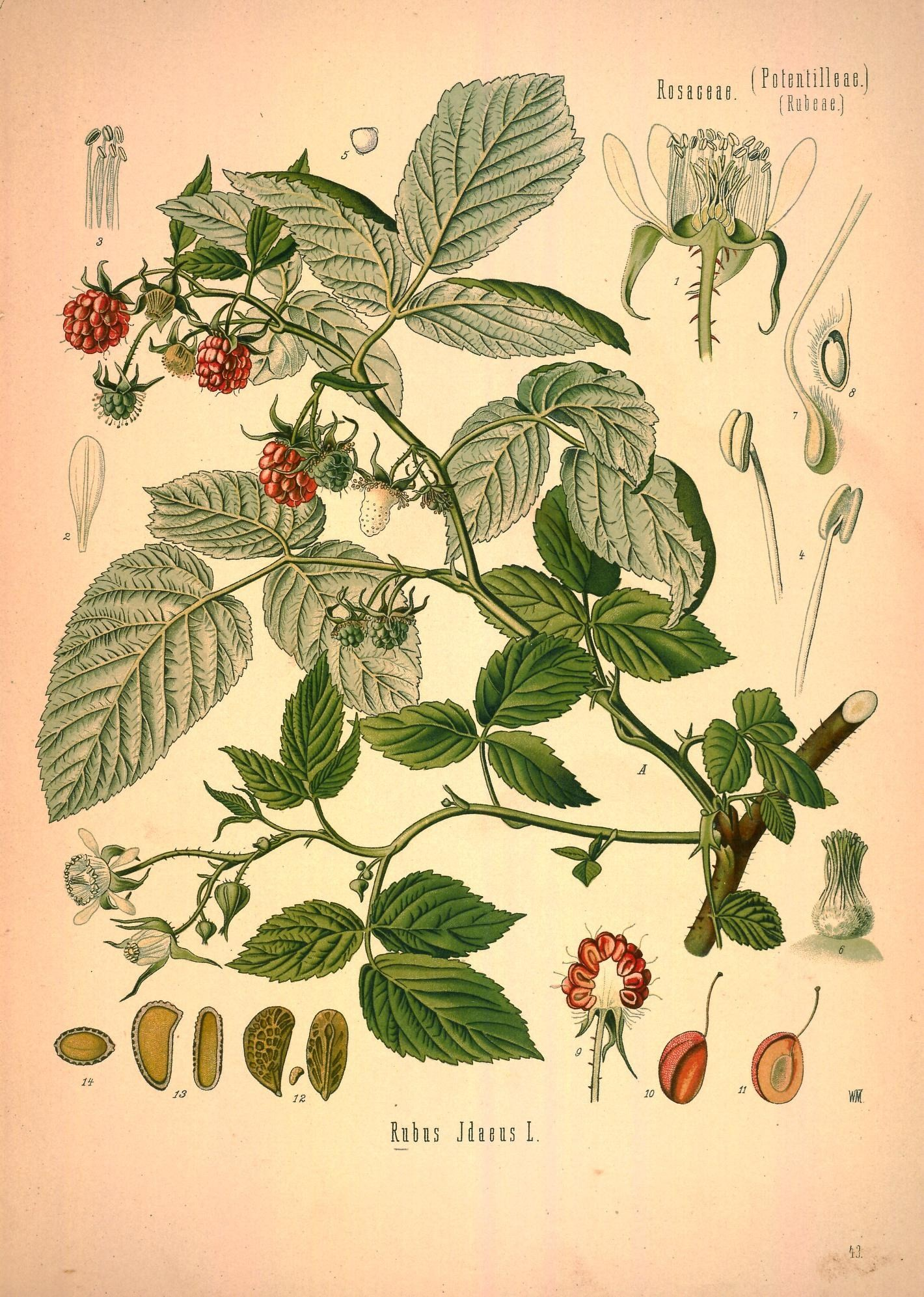 Himbeere. A blühender und fruchtender Zweig in natürl. Grösse; 1 Blüthe im Längsschnitt, vergrössert; 2 Kronblatt, desgl.; 3 Staubgefässreihe, desgl.; 4 einzelne Staubgefässe, stärker vergrössert; 5 Pollen, desgl.; 6 Stempel, desgl.; 7 einzelnes Fruchtblatt, desgl.; 8 dasselbe im Längsschnitt, desgl.; 9 Frucht im Längsschnitt, desgl.; 10 Steinfrüchtchen, desgl.; 11 dasselbe im Längsschnitt, desgl.; 12 Steinschale, nalürl. Grösse und vergrössert; 13 u. 14 Samen im Längs- und Querschnitt, desgl.